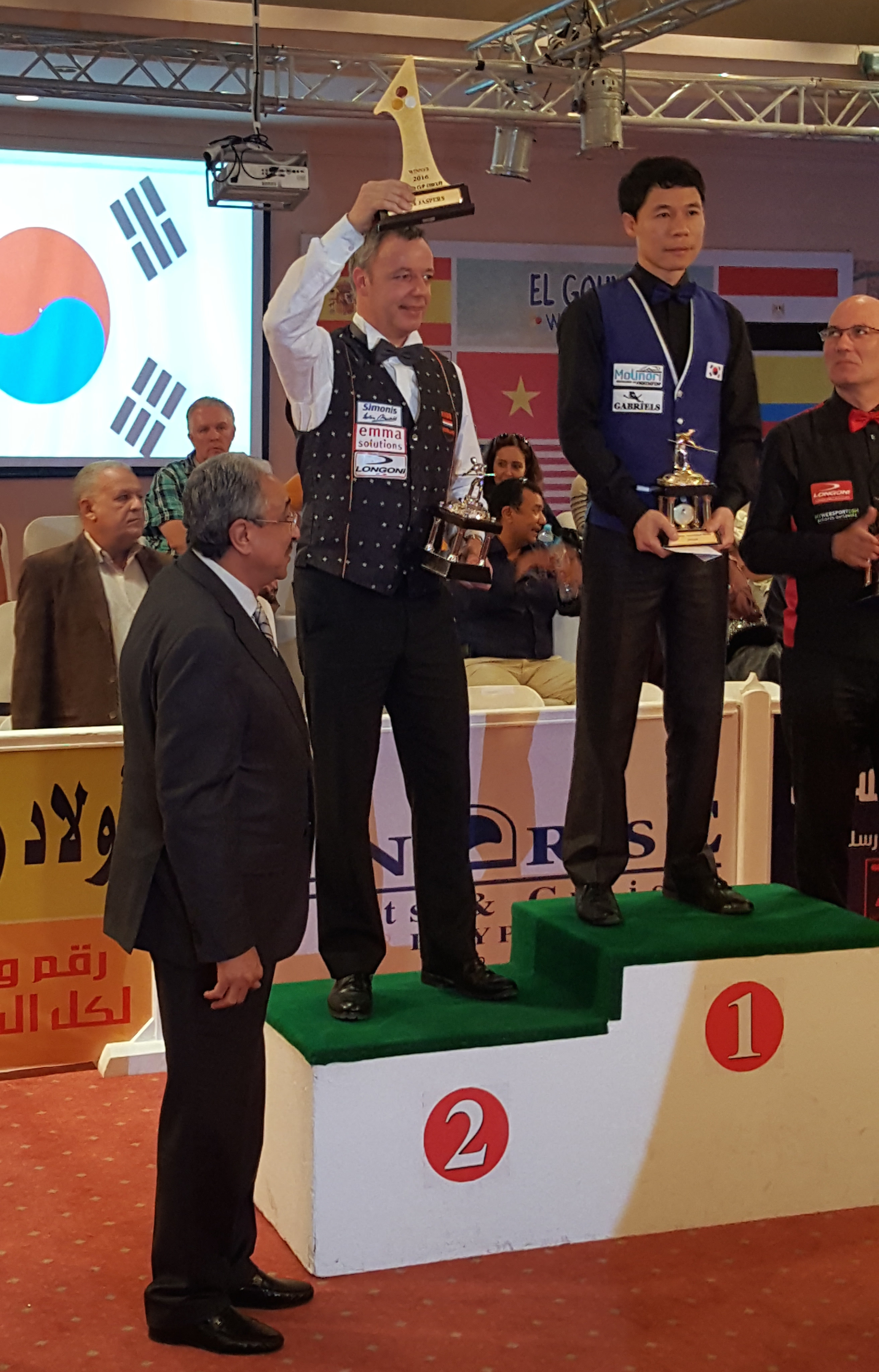 siehe DateinameDick Jaspers erhält zusätzlich zu seiner Silbermedaille den Pokal für den Gesamtsieger des Weltcups 2016 überreicht durch den Präsidenten der Union Mondiale de Billard (UMB), Farouk El Barki (li.)